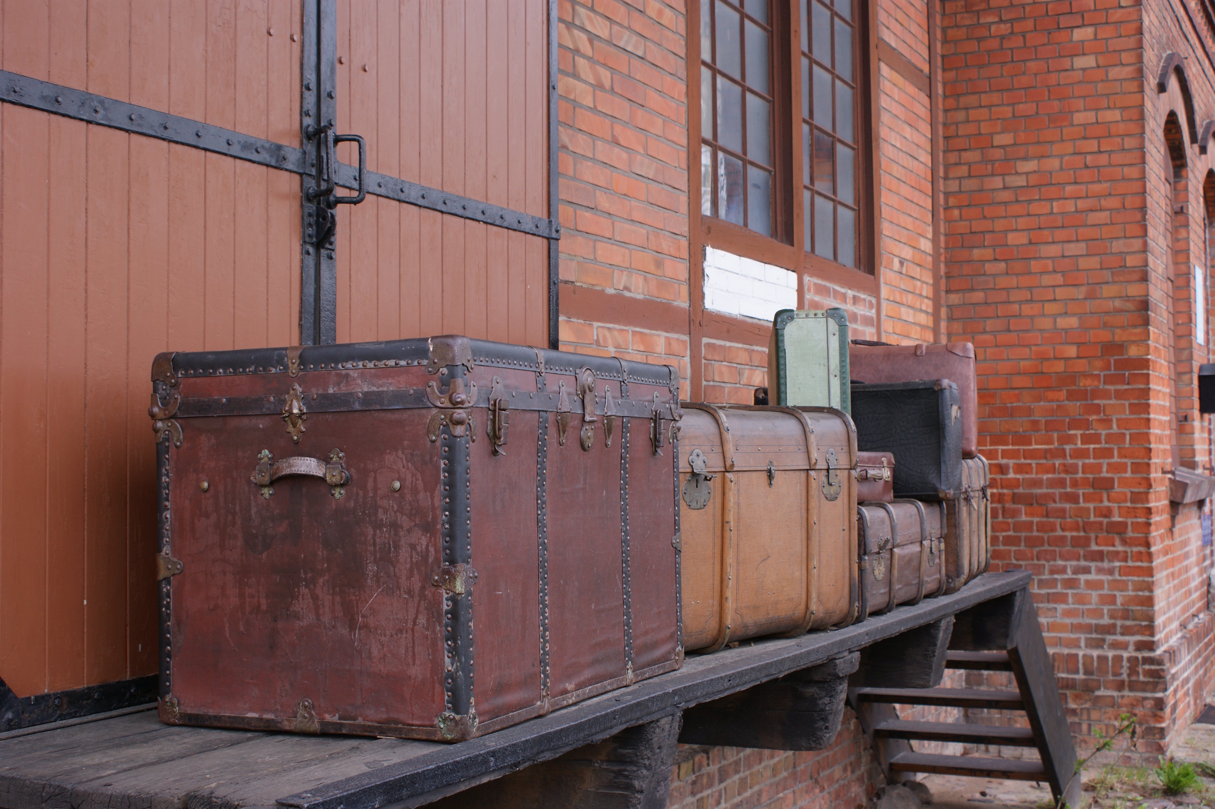 einstige Gepäckabfertigung